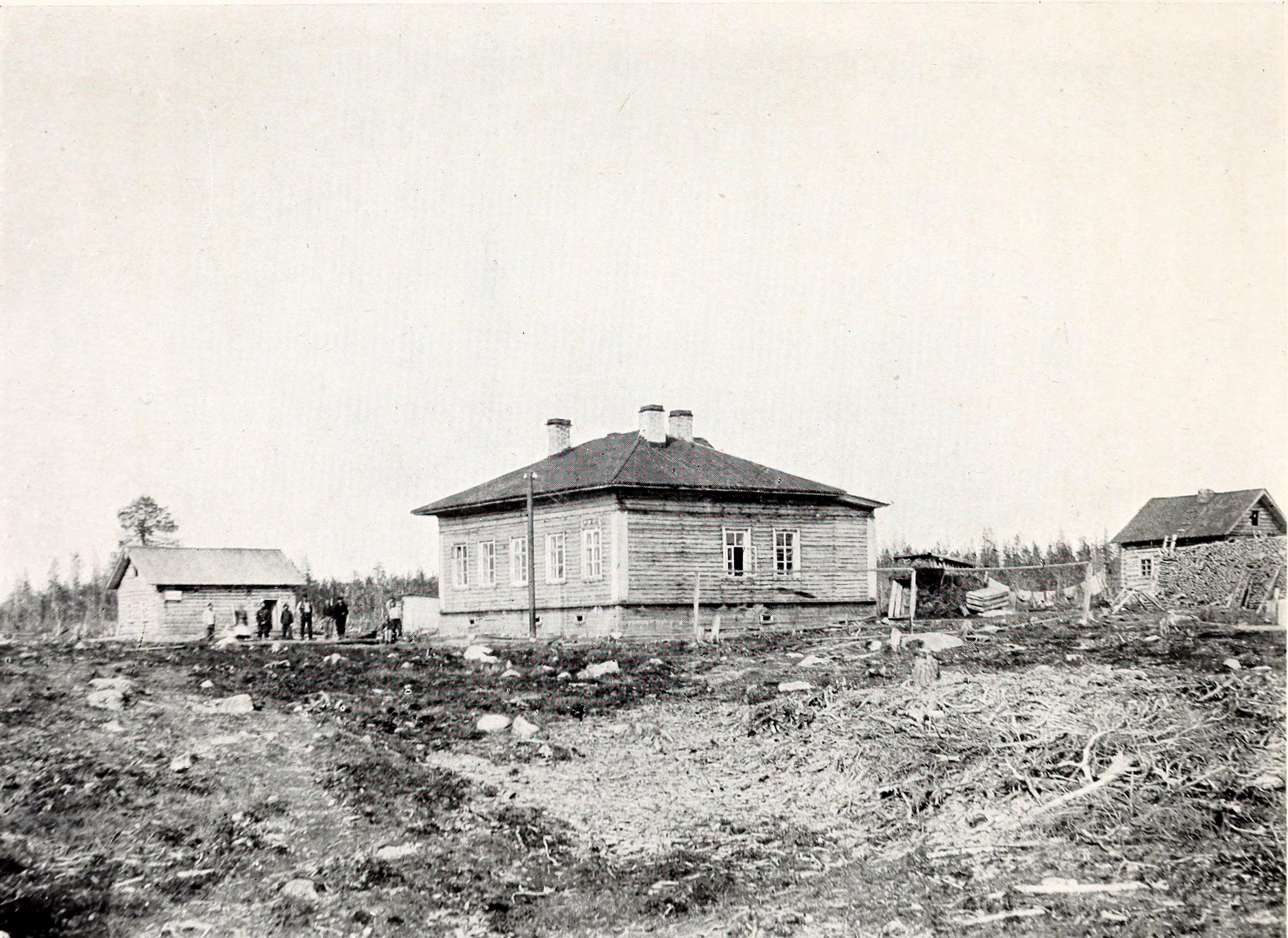 «^ . O ? uj c- N o _J D